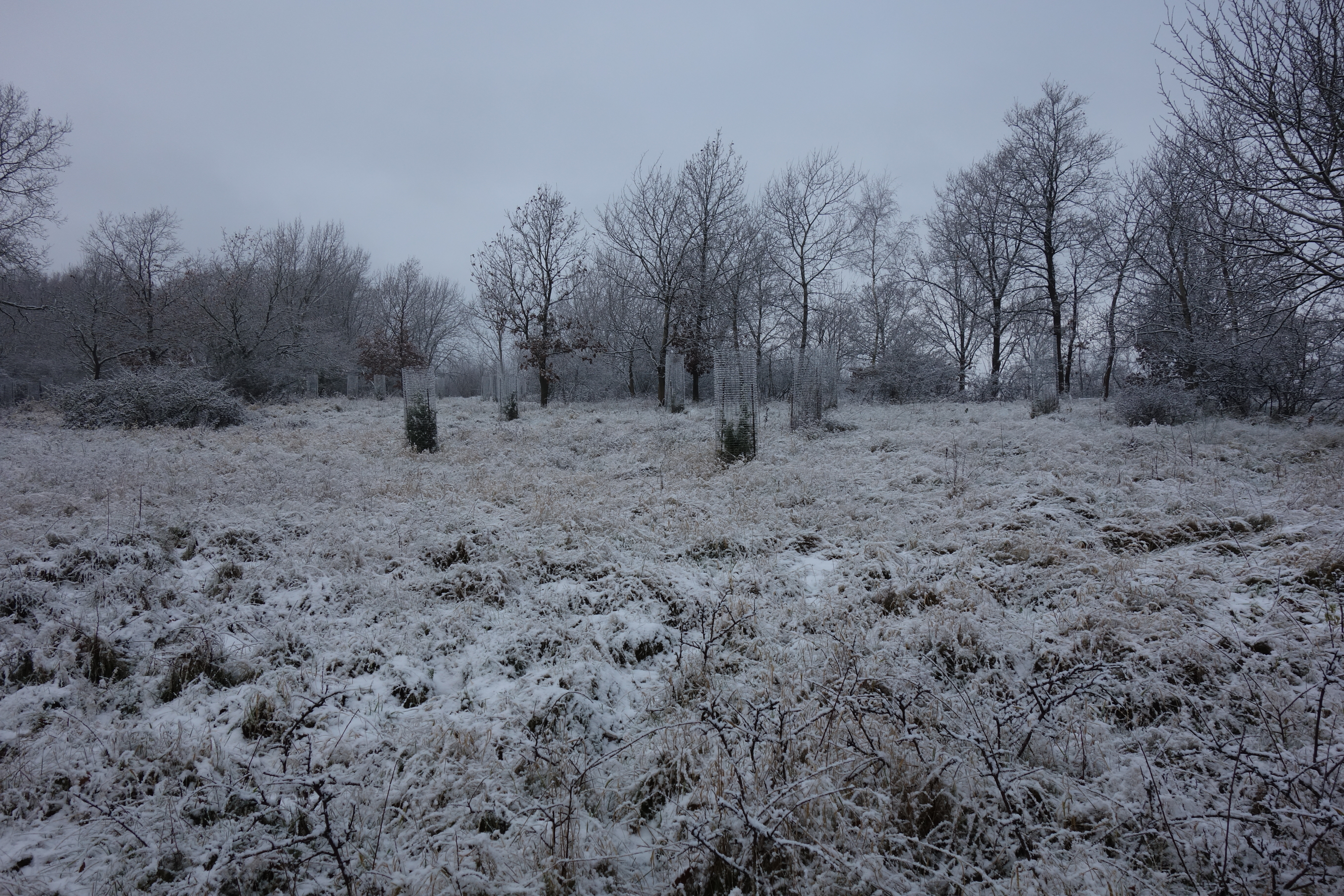 Naturschutzgebiet Hölzchen vom südlichen Rand. Gepflanzte Wachholdern befinden sich in Drahtgestellen.